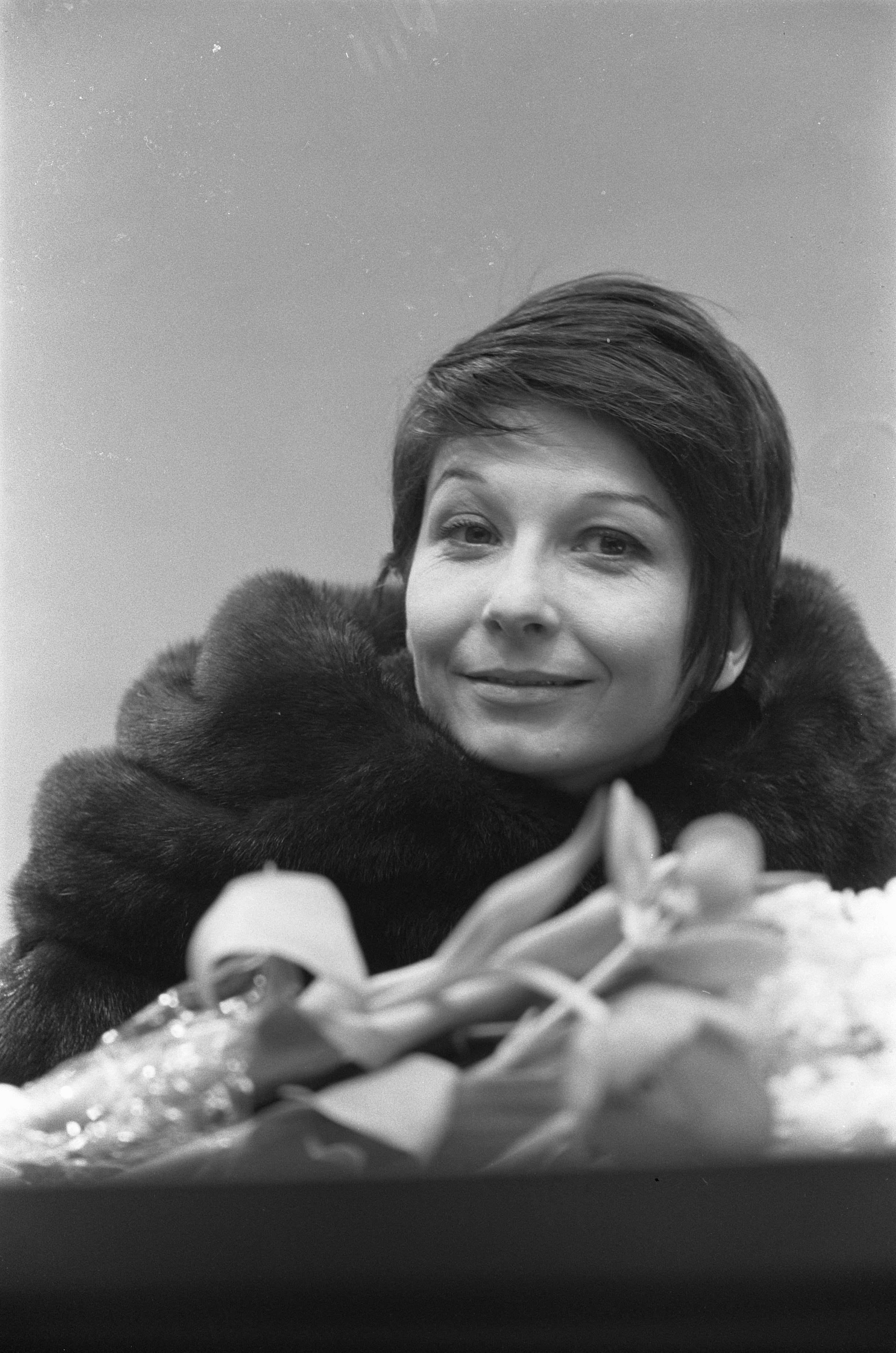 Collectie / Archief : Fotocollectie Anefo Reportage / Serie : [ onbekend ] Beschrijving : Zizi Jeanmaire in Nederland aangekomen. Zizi Jeanmiare op Schiphol Datum : 25 februari 1963 Trefwoorden : aankomsten Persoonsnaam : Zizi, Jeanmaire Fotograaf : Pot, Harry / Anefo Auteursrechthebbende : Nationaal Archief Materiaalsoort : Negatief (zwart/wit) Nummer archiefinventaris : bekijk toegang 2.24.01.05 Bestanddeelnummer : 914-8658